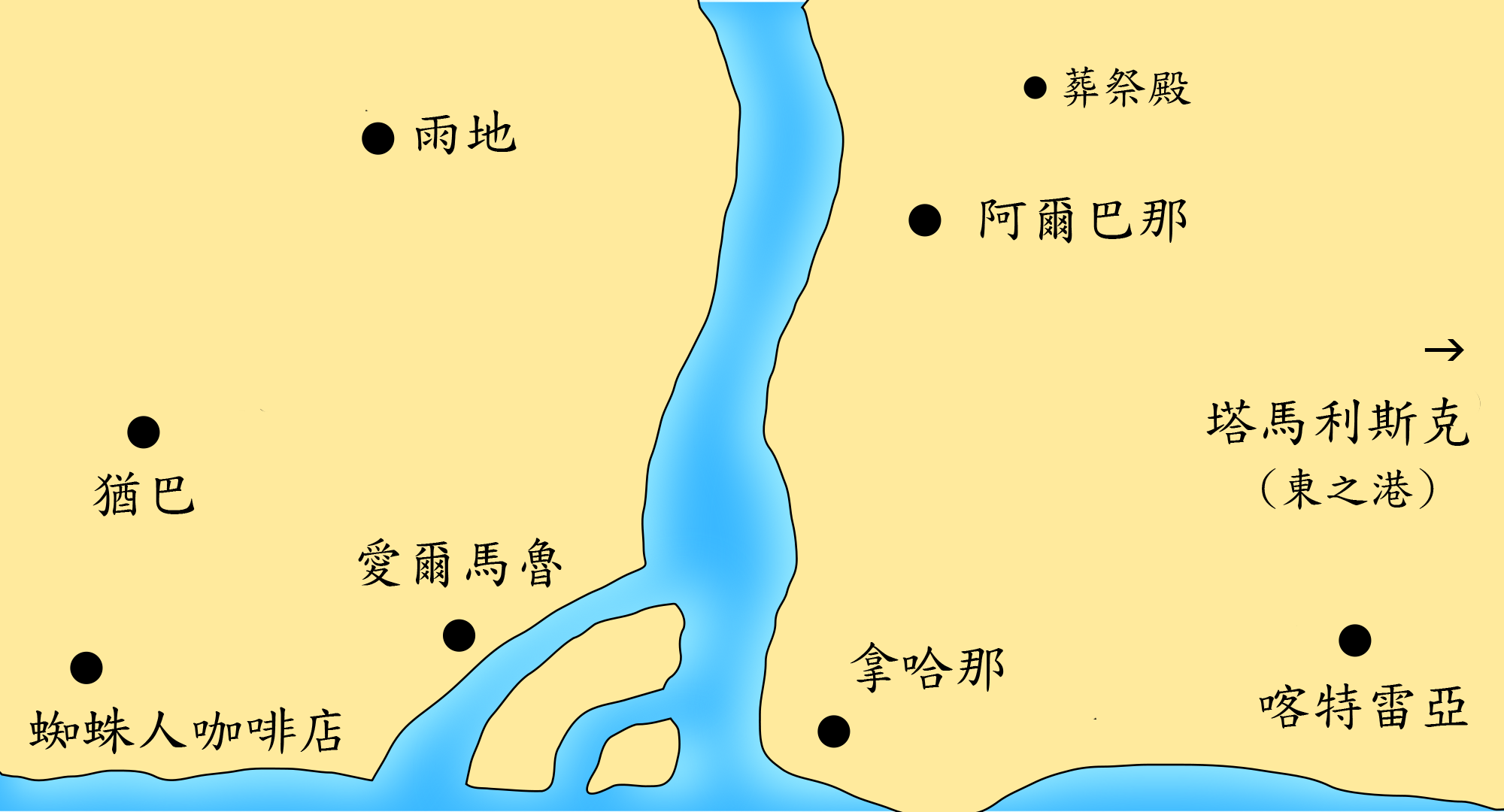 漫畫《ONE PIECE》內阿拉巴斯坦王國的地理位置示意圖(繁體(台灣))版本